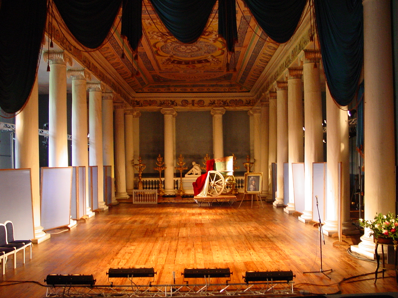 Останкинский дворец. Театр. Theatre in Ostankino Palace